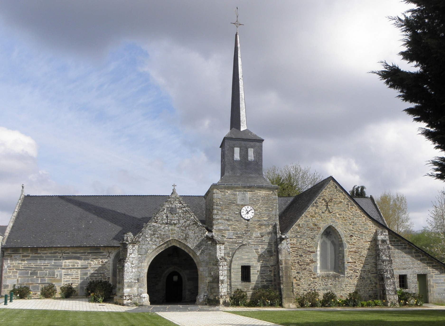 Église Saint-Aignan, commune de Saint-Aignan (56). Vue méridionale.